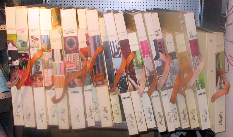 Stalenboeken